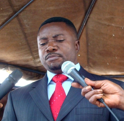 Alphonse Ngoy Kasanji, homme politique congolais